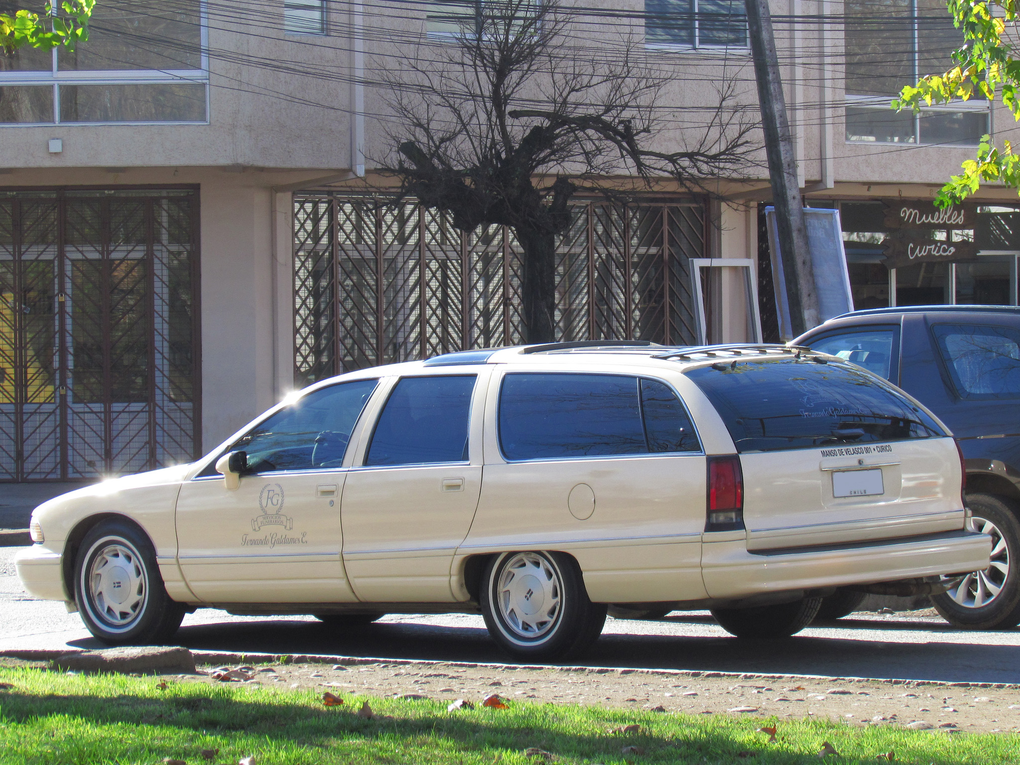 Oldsmobile Custom Cruiser 1992